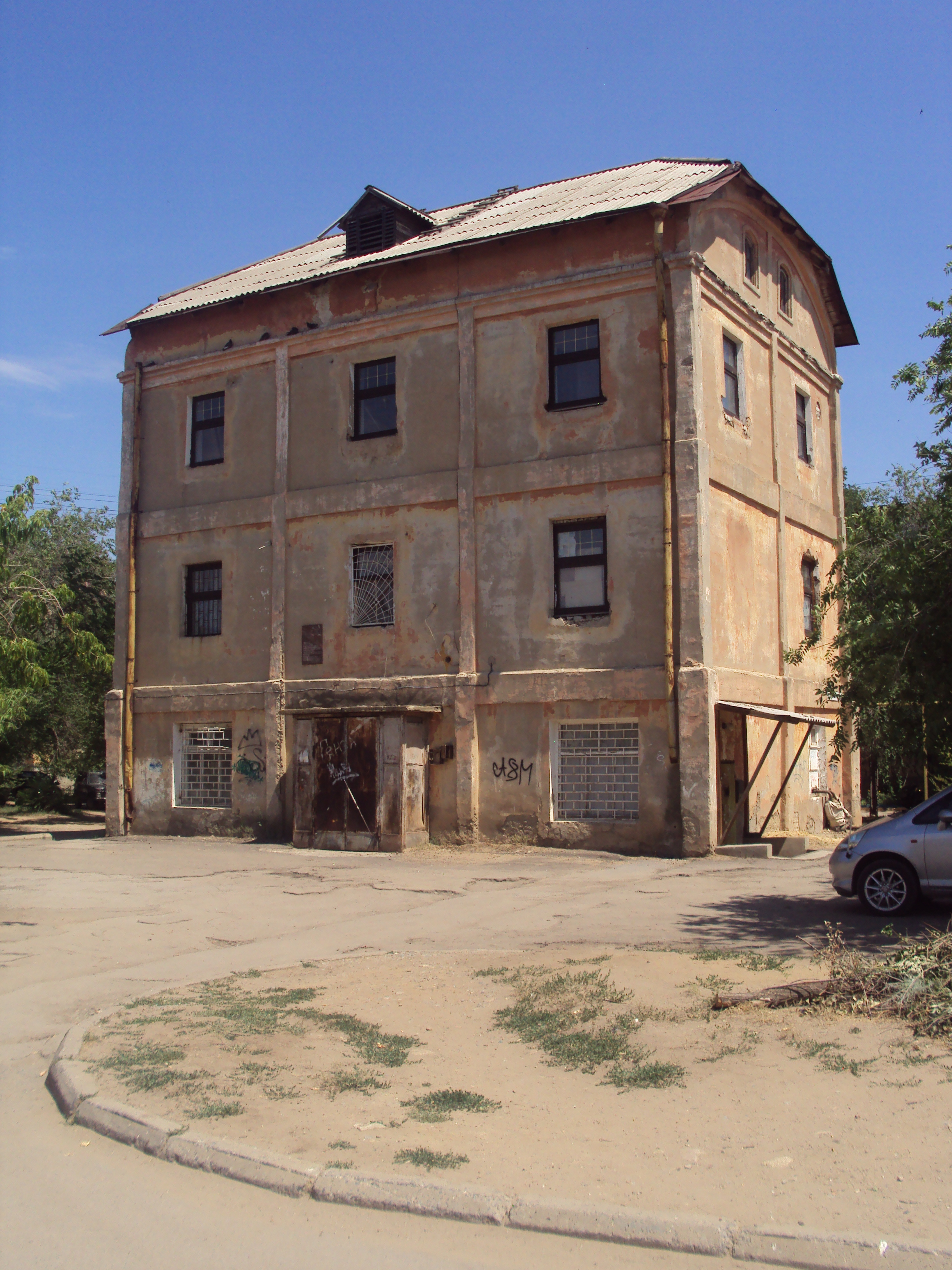 Здание паровой мельницы, в котором в 1942 году находился наблюдательный пункт 300-й стрелковой дивизии. Здание находится в городе Волжском Волгоградской области.